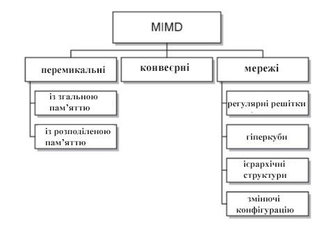 івпаваролопаа